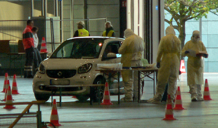 Probenabnahme im Corona Drive in Testcenter in Hannover